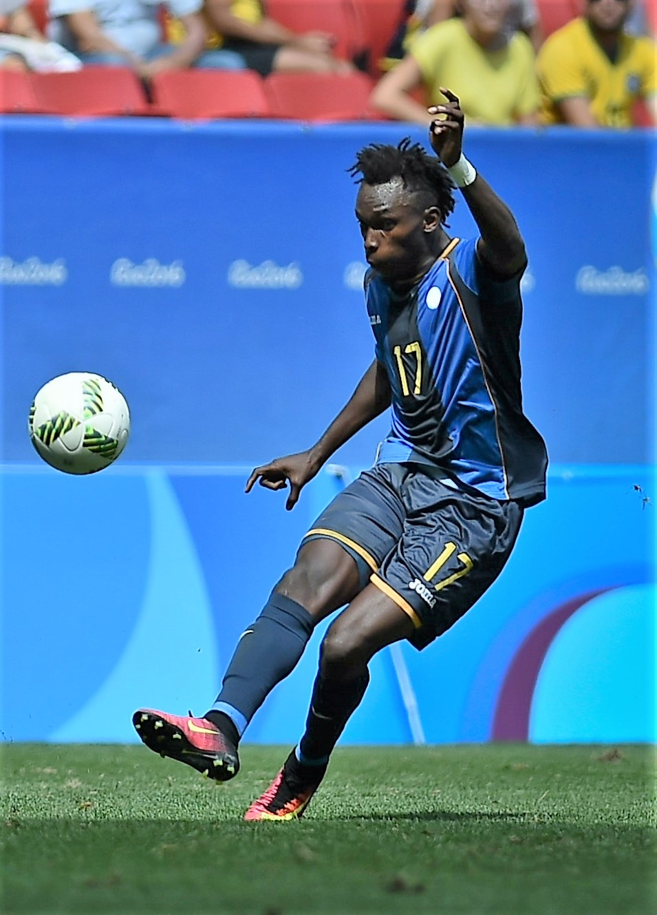 Estádio Nacional de Brasília Mané Garrincha, Brasília, DF, Brasil, 10/8/2016. Argentina e Honduras jogam nesta quarta-feira (10), no Estádio Mané Garrincha, pelo grupo D do futebol masculino nas Olimpíadas 2016.